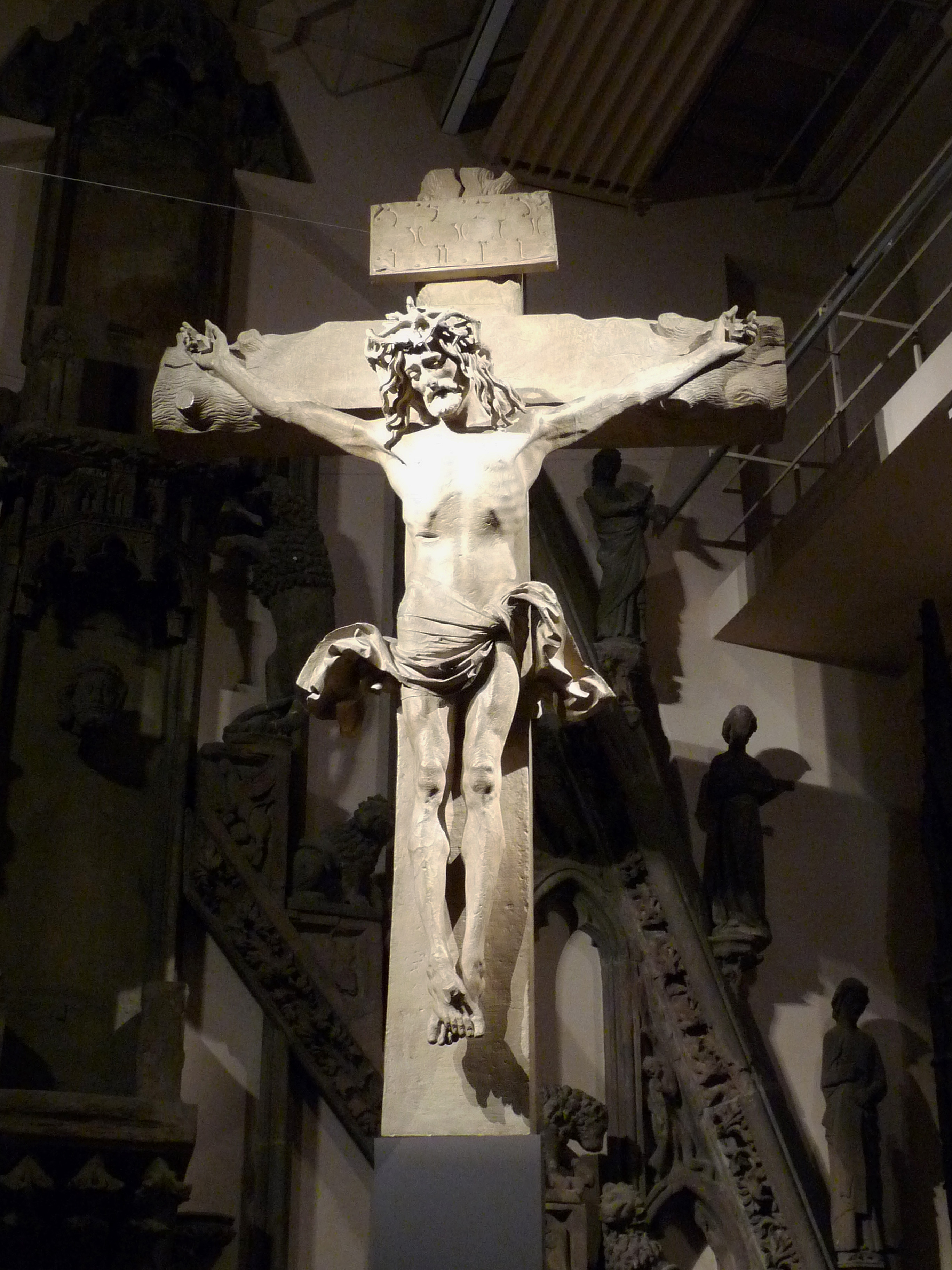 Nicolas de Leyde : crucifix de Baden-Baden